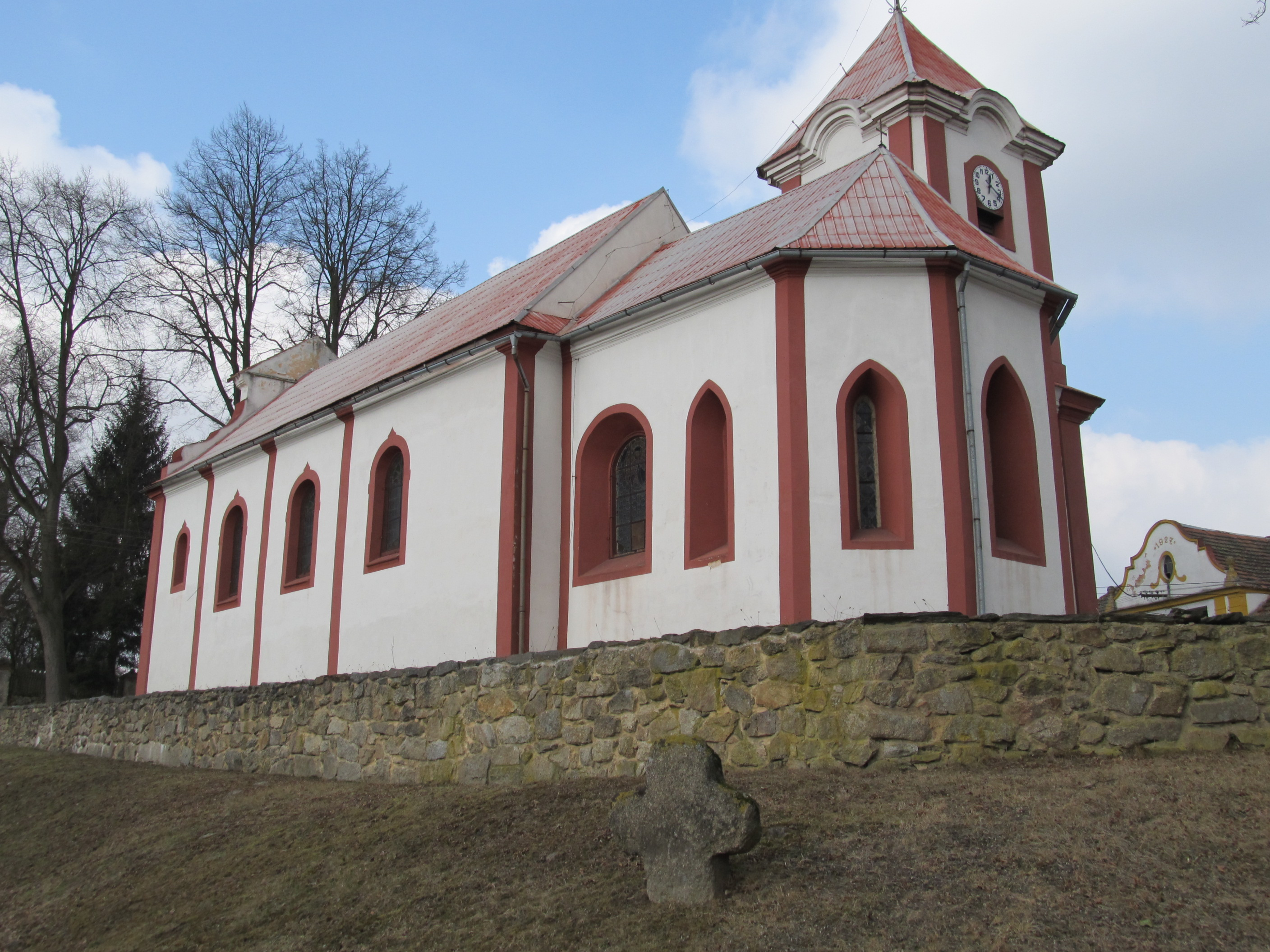 Prostiboř - kostel svatého Mikuláše a smírčí kříž